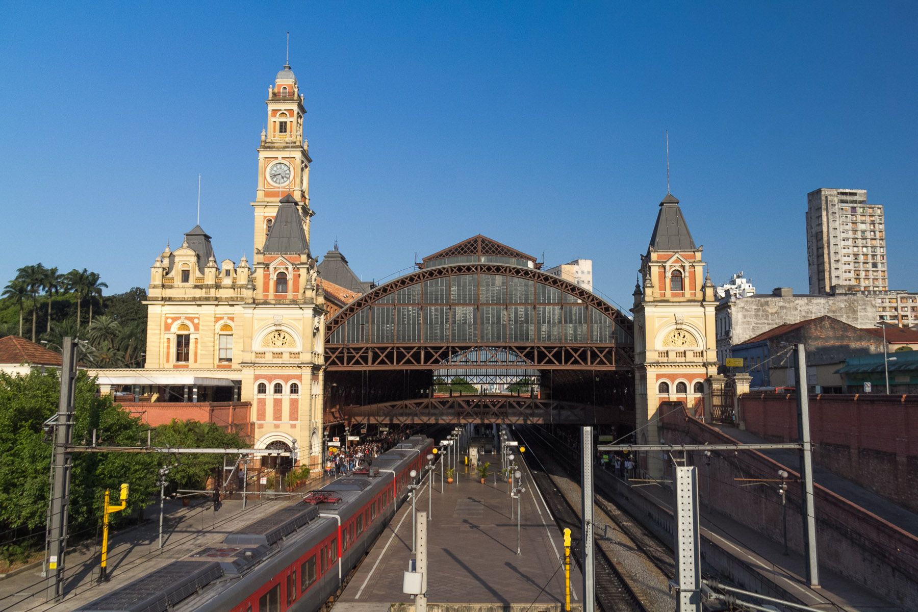 Estaçao da luz,Sao Paulo,Brasil,foto tomada em Outubro 2013